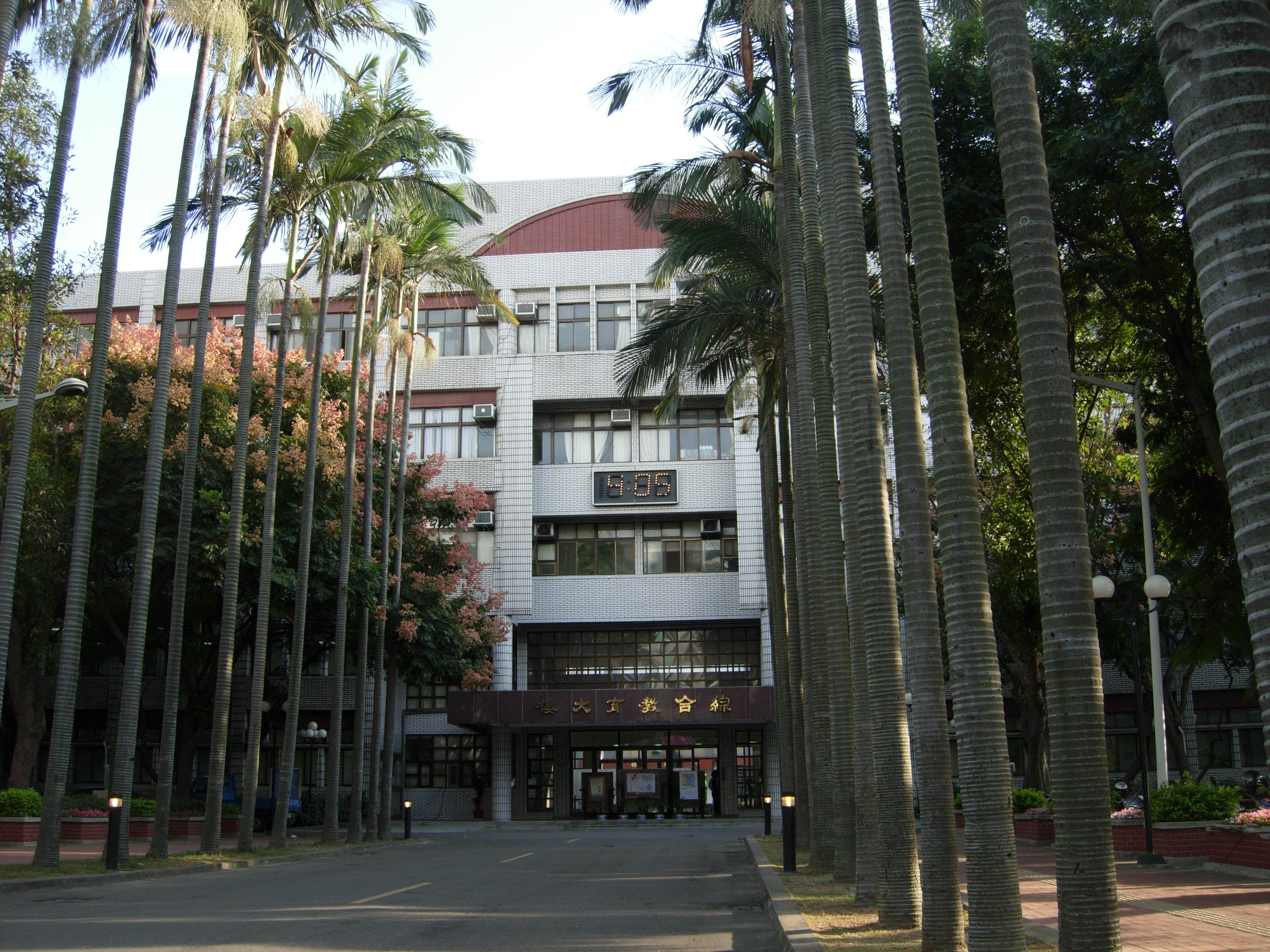 国立新竹教育大学入口大道及综合教育大楼